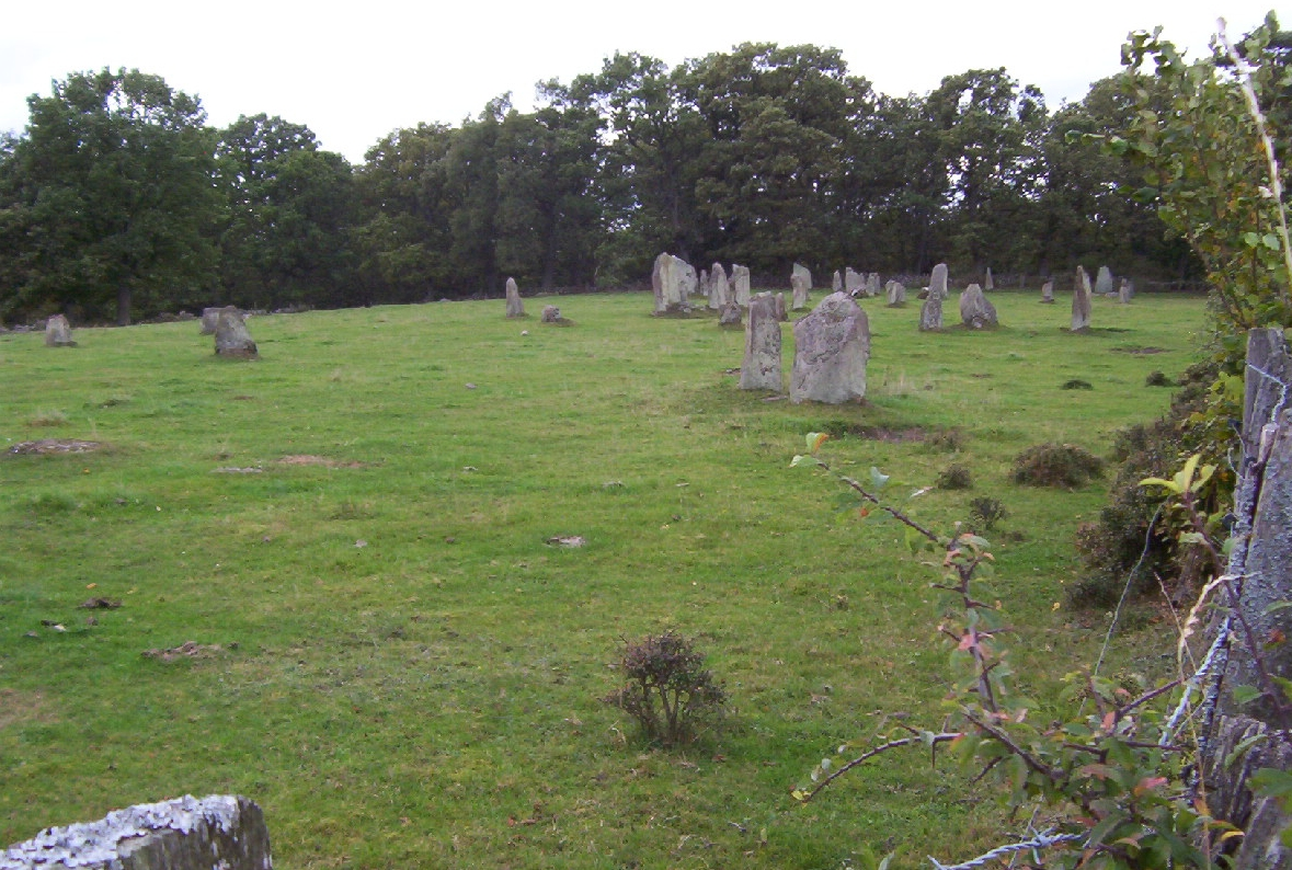 Gravfältet Stångabjär/Steinabjär, Åraslöv